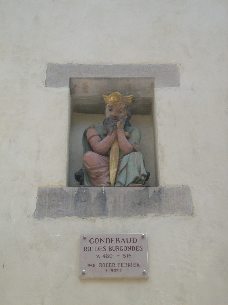 Statuette de Gondebaud, roi des Burgondes, dans la façade d'une maison de la vieille-ville de Genève (Suisse)